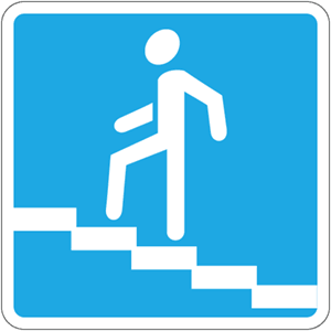 Дорожный знак 6.7 "Надземный пешеходный переход".